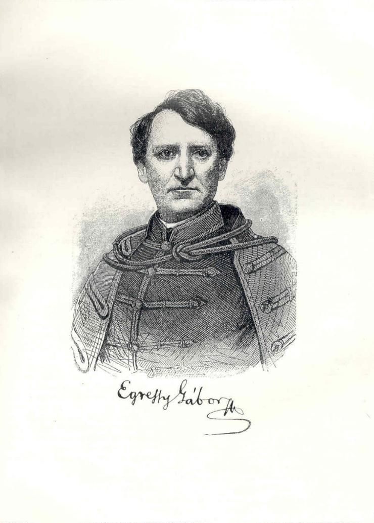 Egressy Gábor magyar színész portréja, metszet, ismeretlen alkotó műve. A Pesti Napló ajándék kötetéből 1920